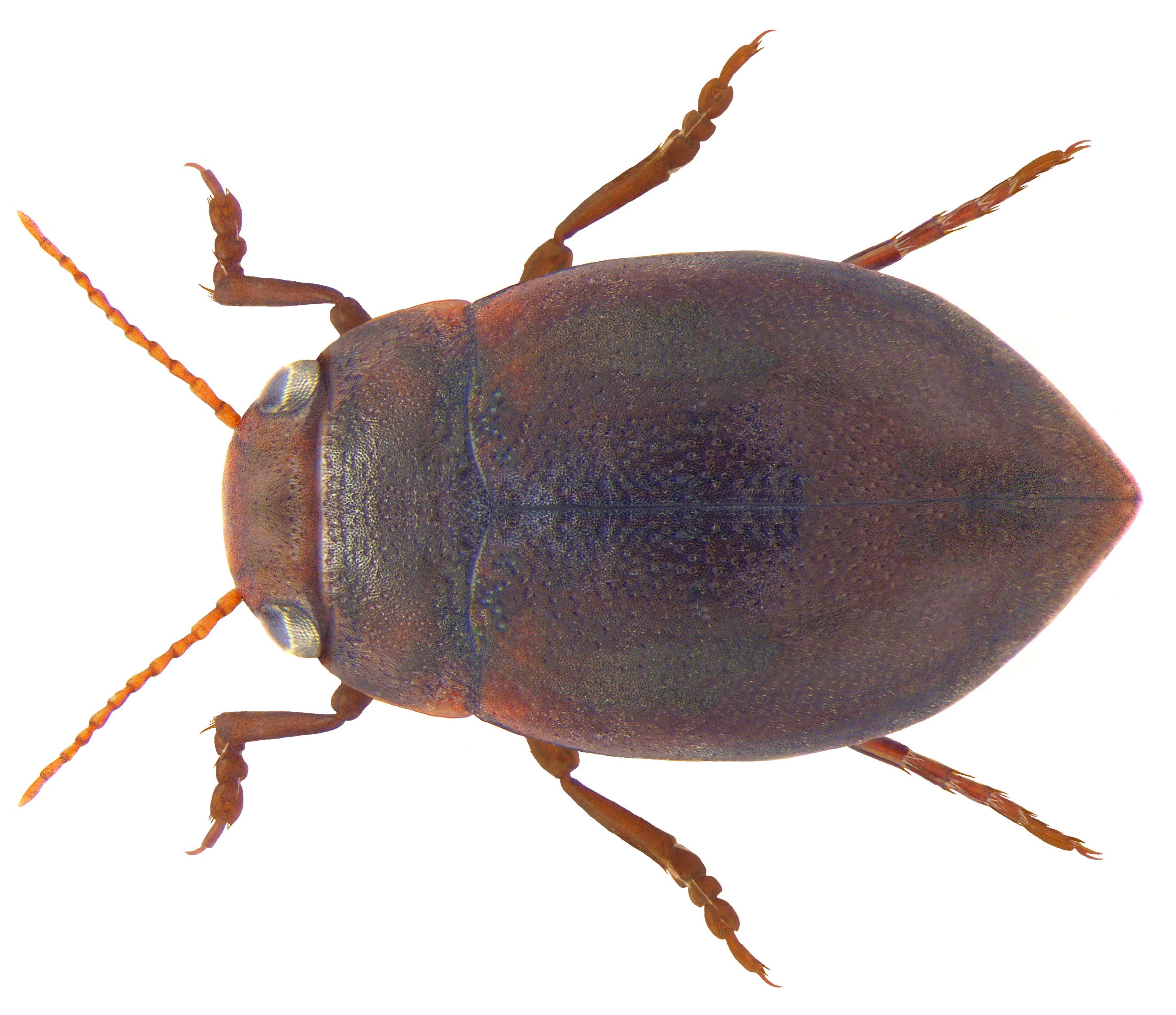 Deronectes latus (Stephens, 1829) male Familie: Dytiscidae Groesse: 4,6 mm Verbreitung: Nord- und Mitteleuropa Fundort: Germania, Bayern, Oberfranken, Kirchbrünnlein, Regnitz leg. det. A.Skale, 1998 Photo: U.Schmidt, 2009